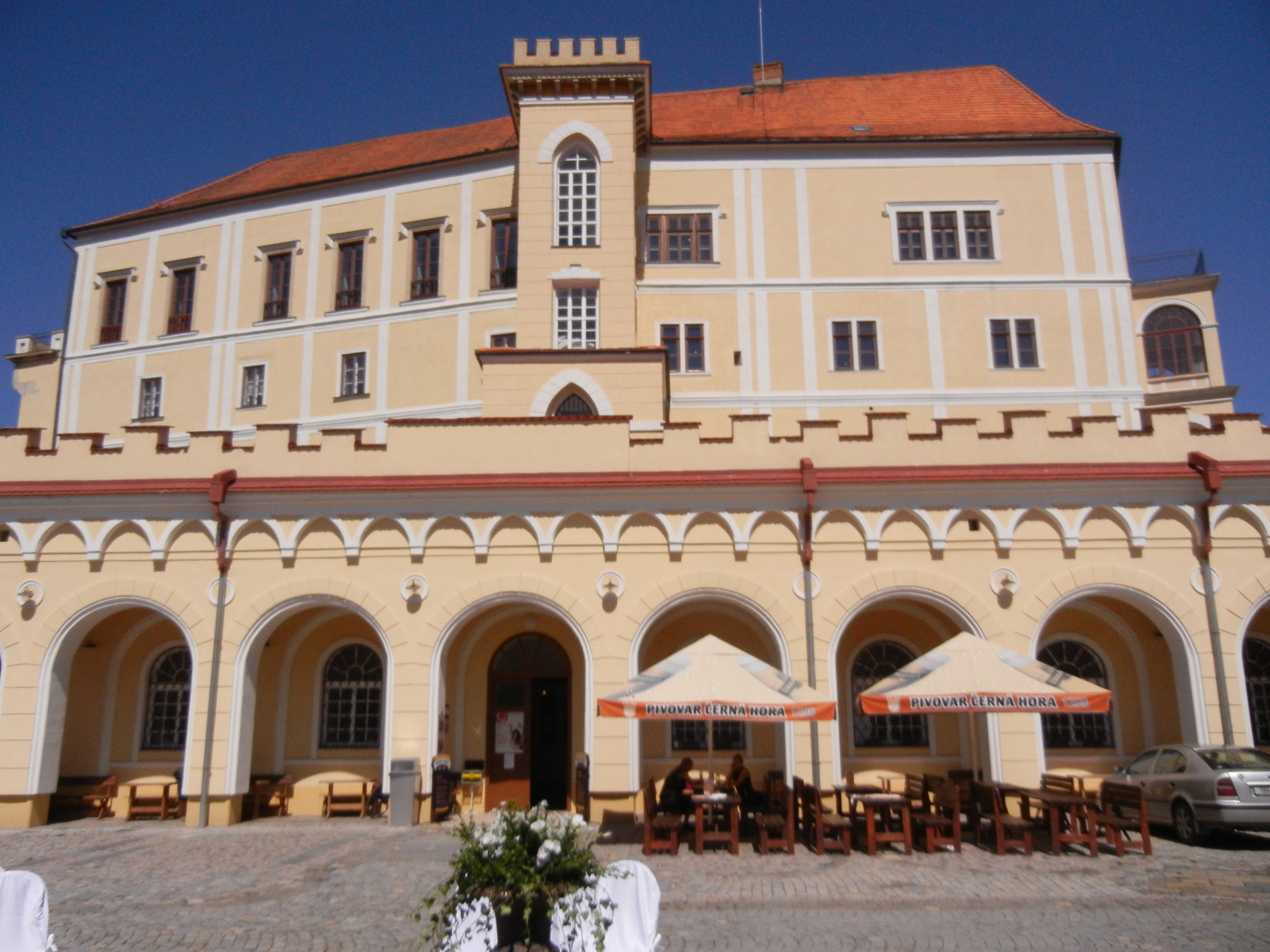 Zámek Letovice, Letovice 1